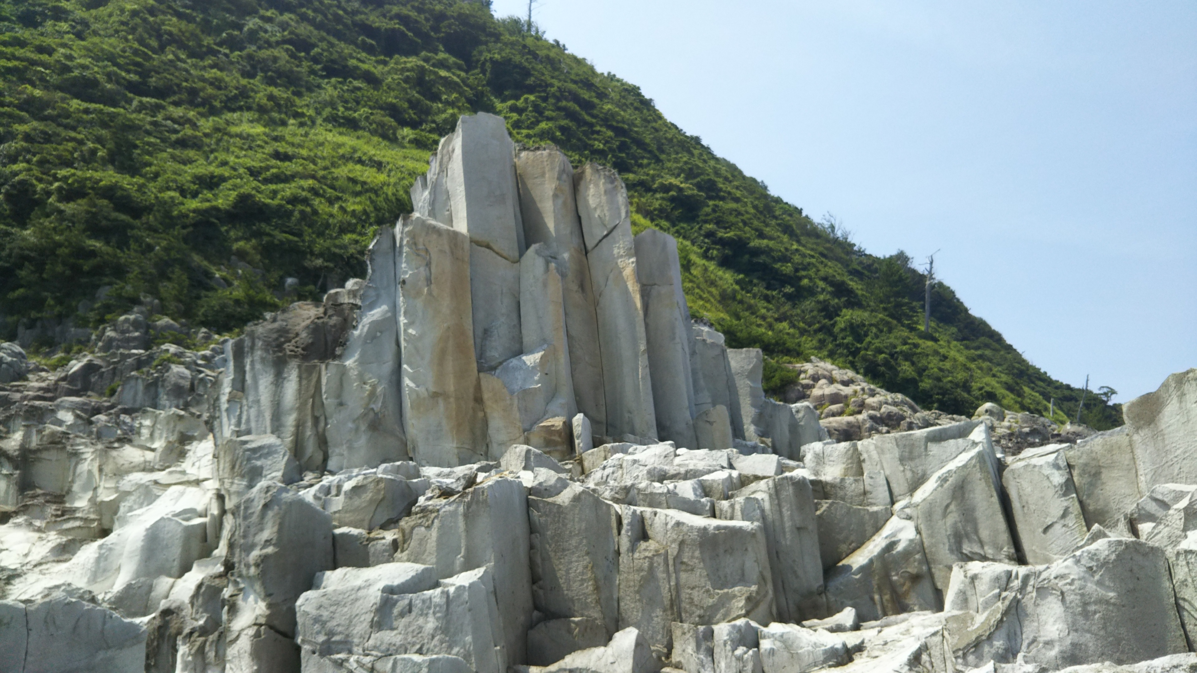 経ヶ岬（京都府京丹後市丹後町袖志）